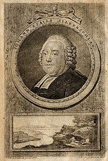 中文（中国大陆）: Beschreibung Johann Esaias Silberschlag (* 16. November 1721; † 22. November 1791), deutscher lutherischer Theologe und Naturforscher Quelle Universität Trier Urheber bzw. Nutzungsrechtinhaber Daniel Berger (1744-1824) Datum 1776